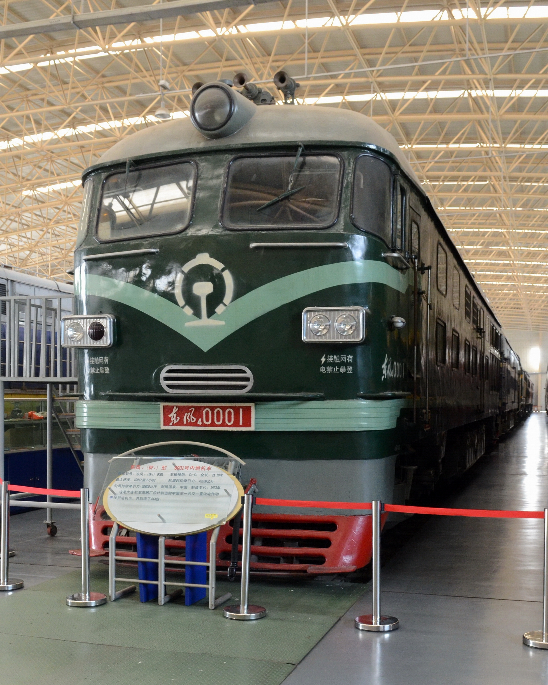 东风4型0001号机车保存在中国铁道博物馆